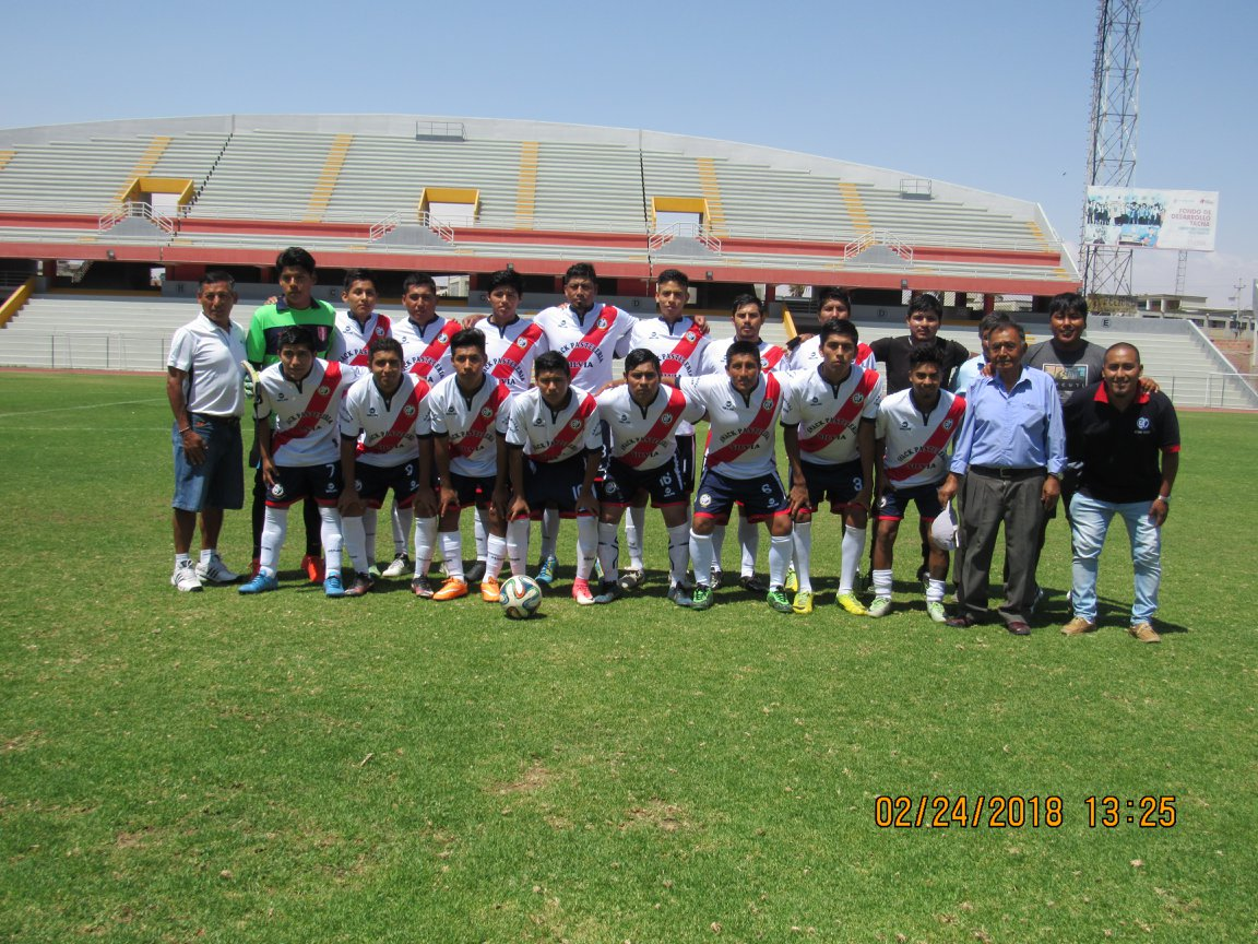 Dirigente Sr. Alejandro Melchor, comando técnico y jugadores.